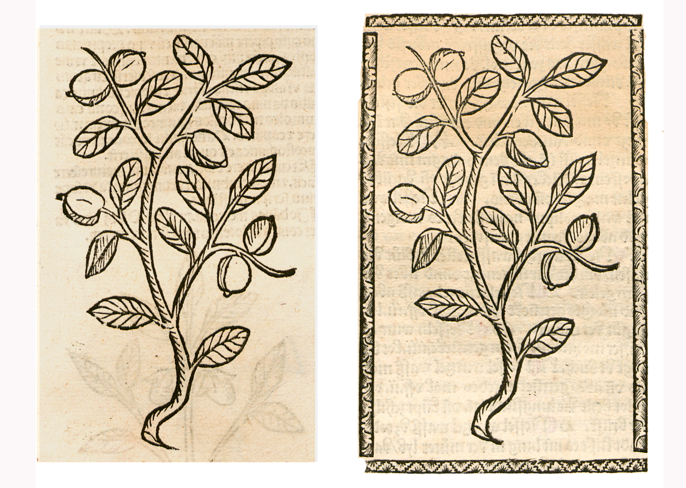 Abbildung von: Nuß (Juglans regia)